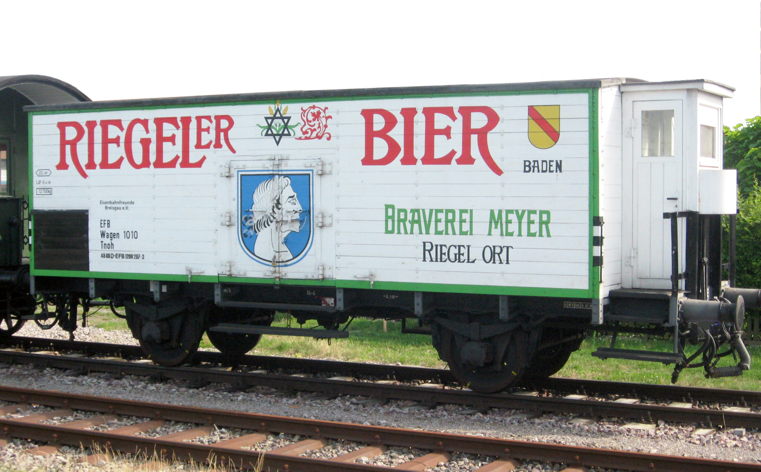 Bierkühlwagen der ehem. Brauereigesellschaft Meyer & Söhne, Riegel am Kaiserstuhl, Fuchs 1928, ex DRG-Nr. Karlsruhe 545101P, Museumsdampfzug Rebenbummler, Eisenbahnfreunde Breisgau e.V. (Freiburg)